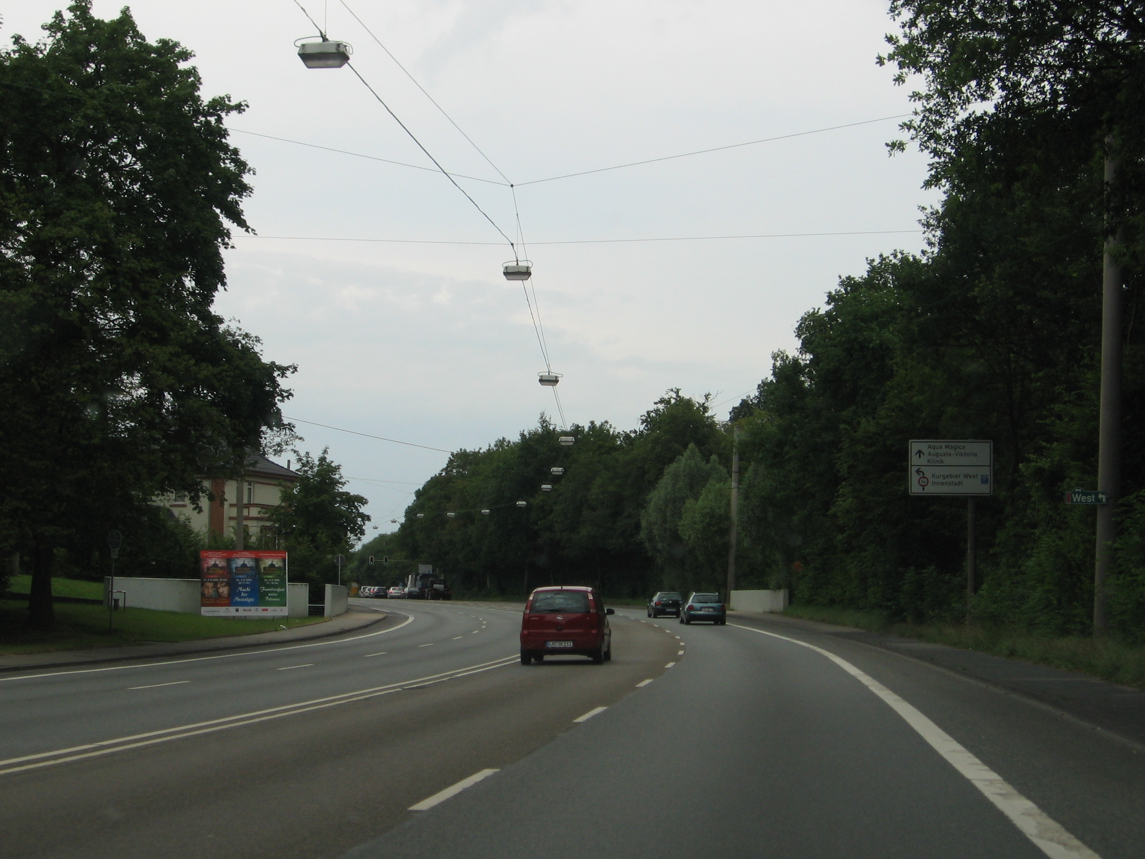 B61, Bad Oeynhausen, Germany